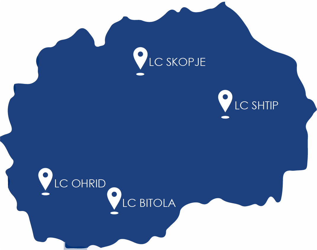 Мапа на сите комитети на ИАЕСТЕ Македонија